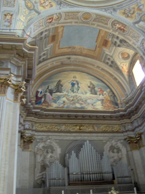 Marco Vaccaro - affreschi dell'abside di San Francesco a Chieti